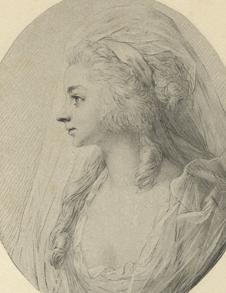 Portrait of Sara Levy, daughter of Daniel Itzig, from Otto Waser's "Anton Graff von Winterthur : Bildnisse des Meisters", Winterthur Kunstverein, 1903.